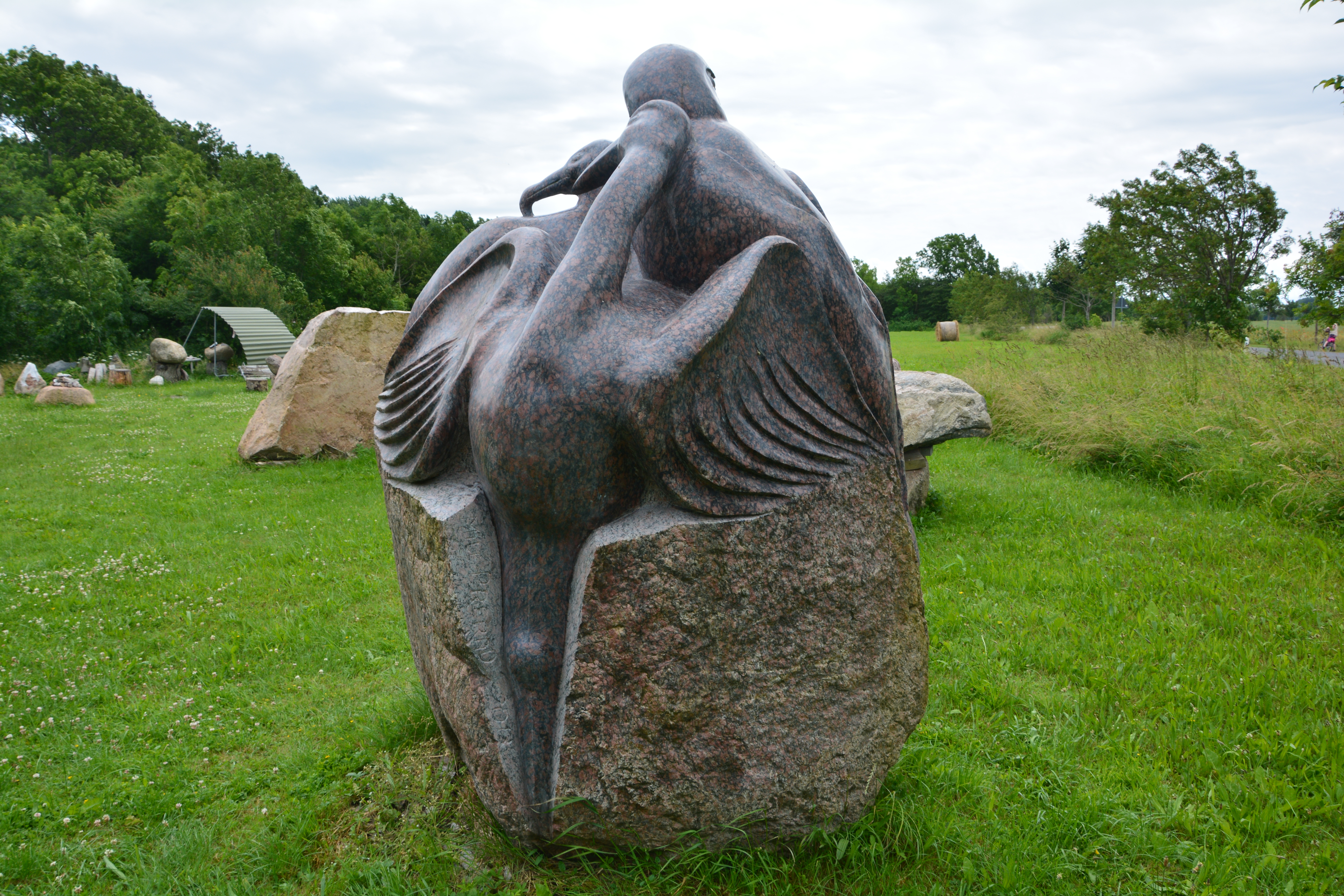 Breege, Lobkewitz, Kranichstein